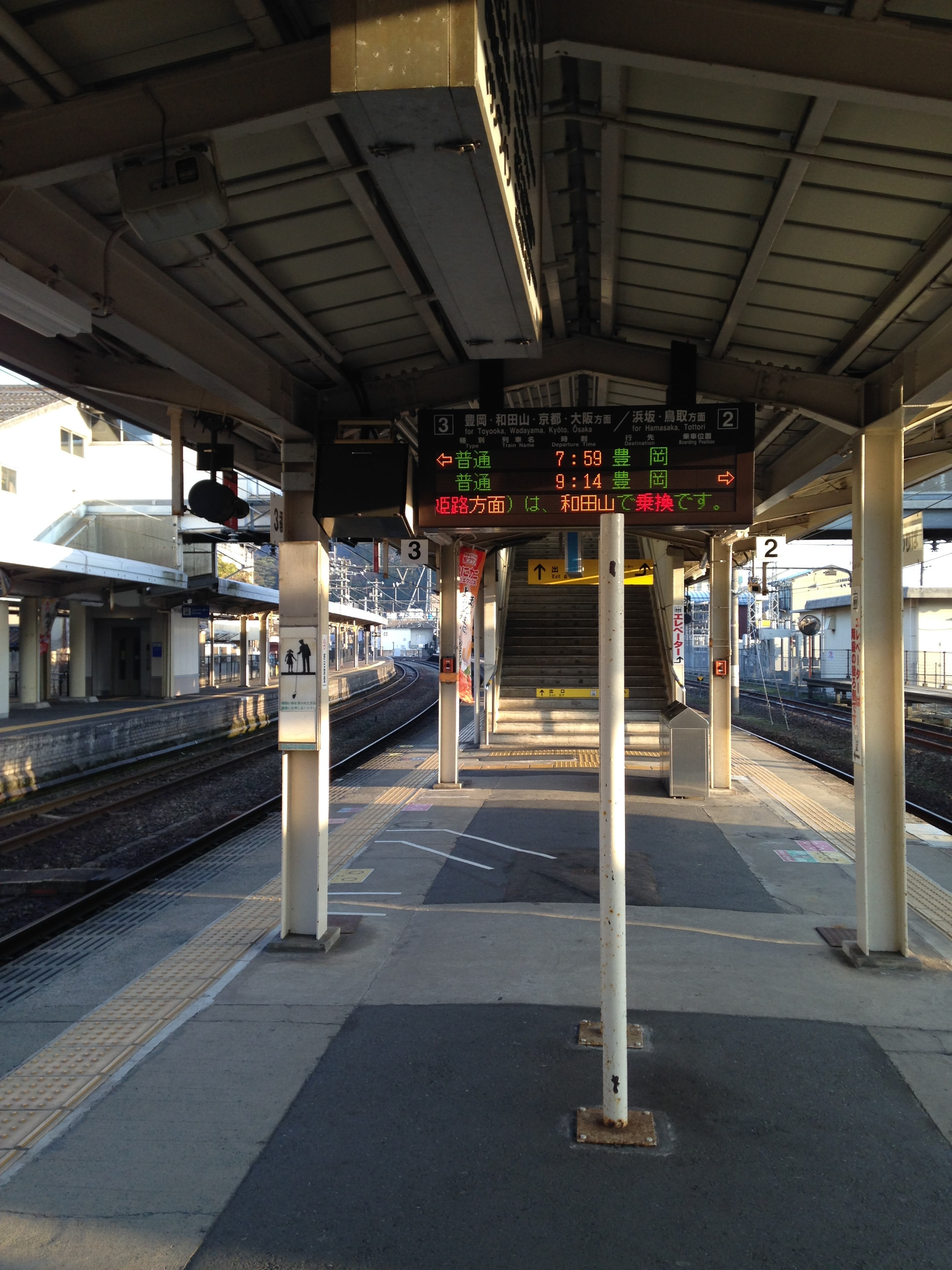 城崎温泉駅ホーム(奥は竹野方面)